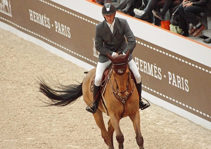 Kevin Staut et Le Prestige St-Lois*de Hus lors du Saut Hermès à Paris (mars 2012).